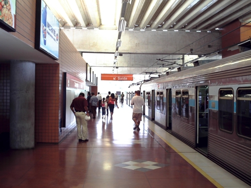 MetroRec - Estação Terminal Camaragibe